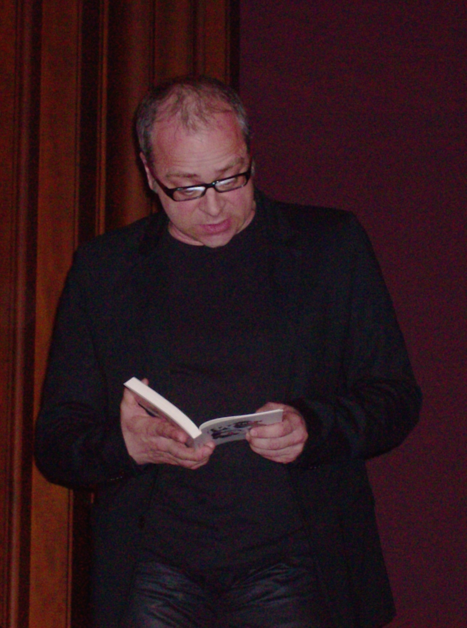 Jerzy Jarniewicz podczas wieczoru poetyckiego, Seryjni poeci, Poznań 24 kwiecień 2012 r.